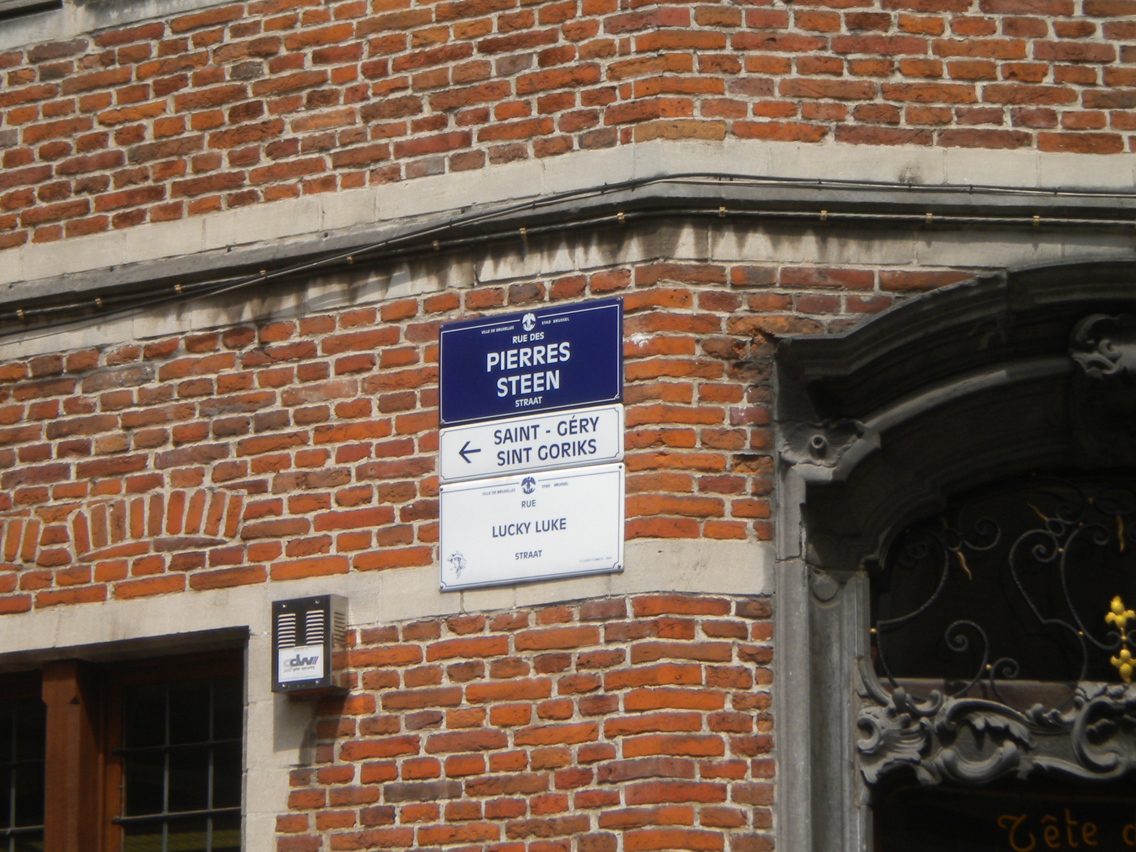 Plaque de la rue Lucky Luke à Bruxelles.